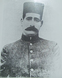 عکس با کیفیت